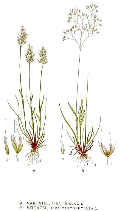 A. Aira praecox L. B. Aira caryophyllea L. s. l. Original Description A. "Vårtåtel", Aira praecox L. B. "Vittåtel", Aira caryophyllea L.